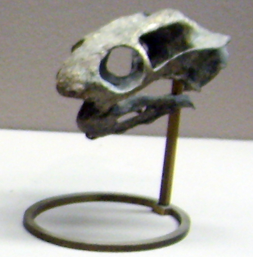 Storthyggnathus haughtoni skull, Naturkunde Museum, Berlin.